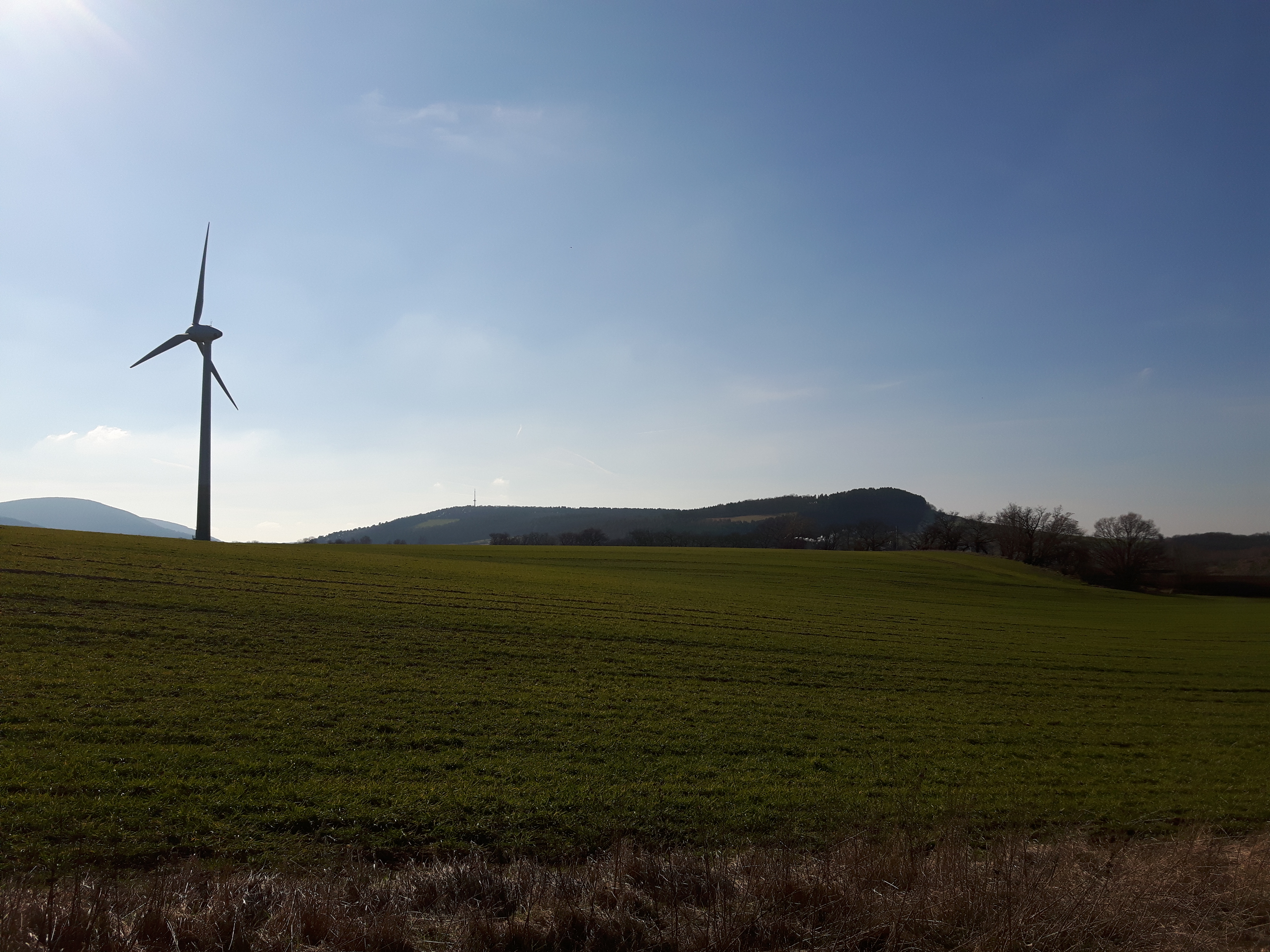 Das Kalte Feld nordwestlich von Harlingerode. Im Hintergrund der Sudmerberg und eine Anlage des Windparks Kaltes Feld.